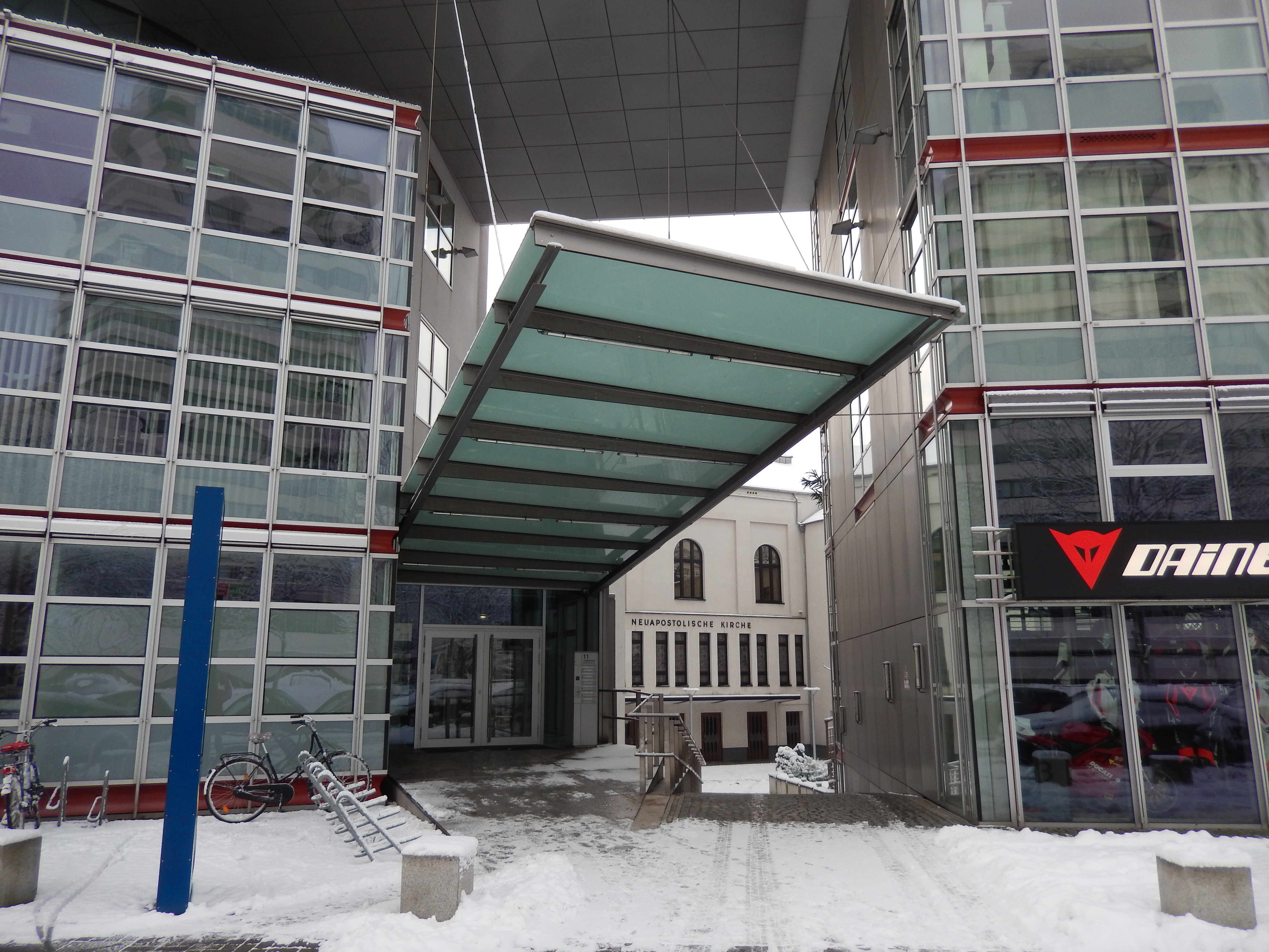 Bürohaus Brühlstraße / Ecke Andertensche Wiese in Hannover